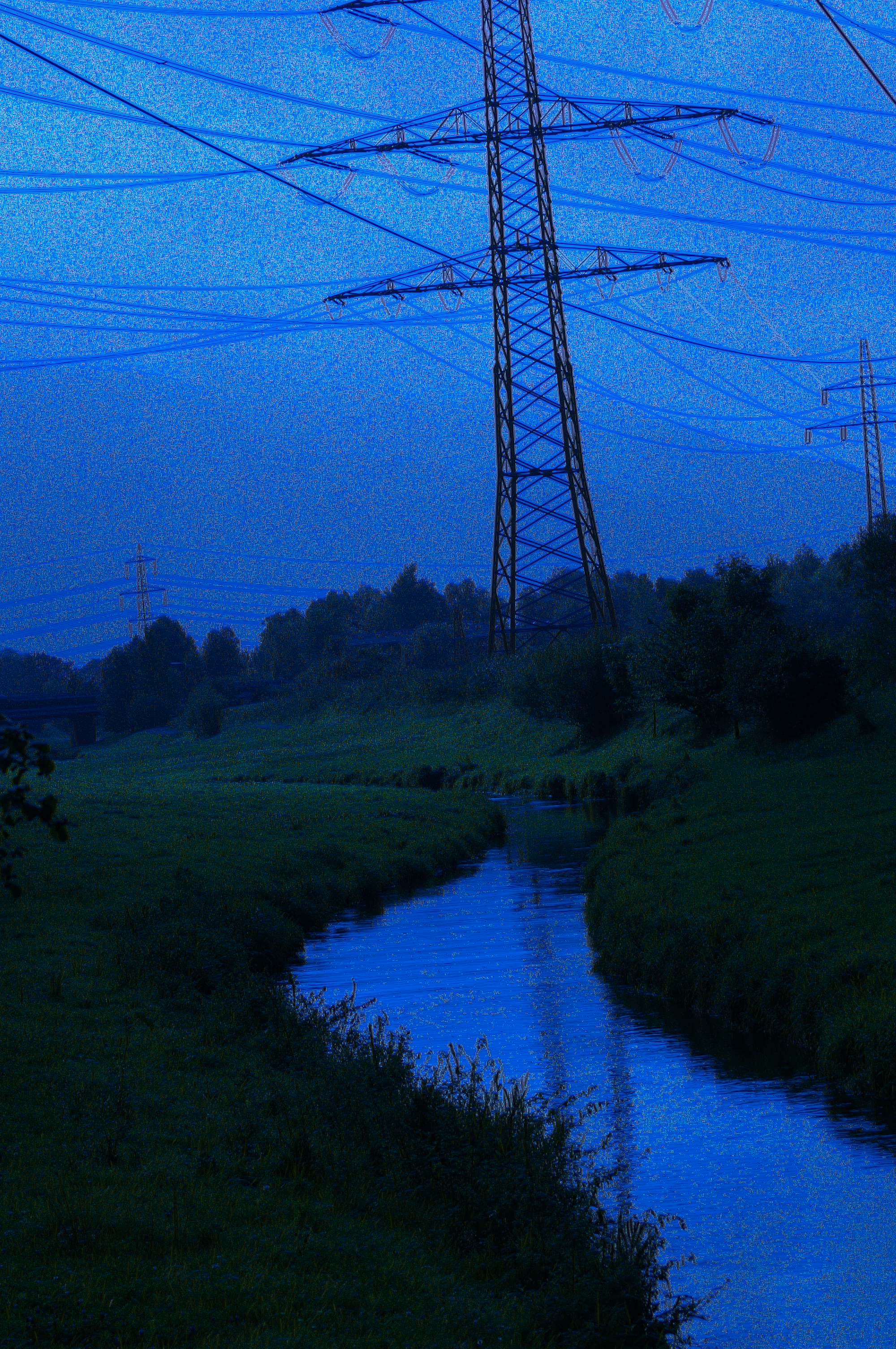 fotografiert mit Konica Minolta Dynax 7D 1.Bild beim Einschalten der Kamera. Bekannt unter der Meldung Error58 .